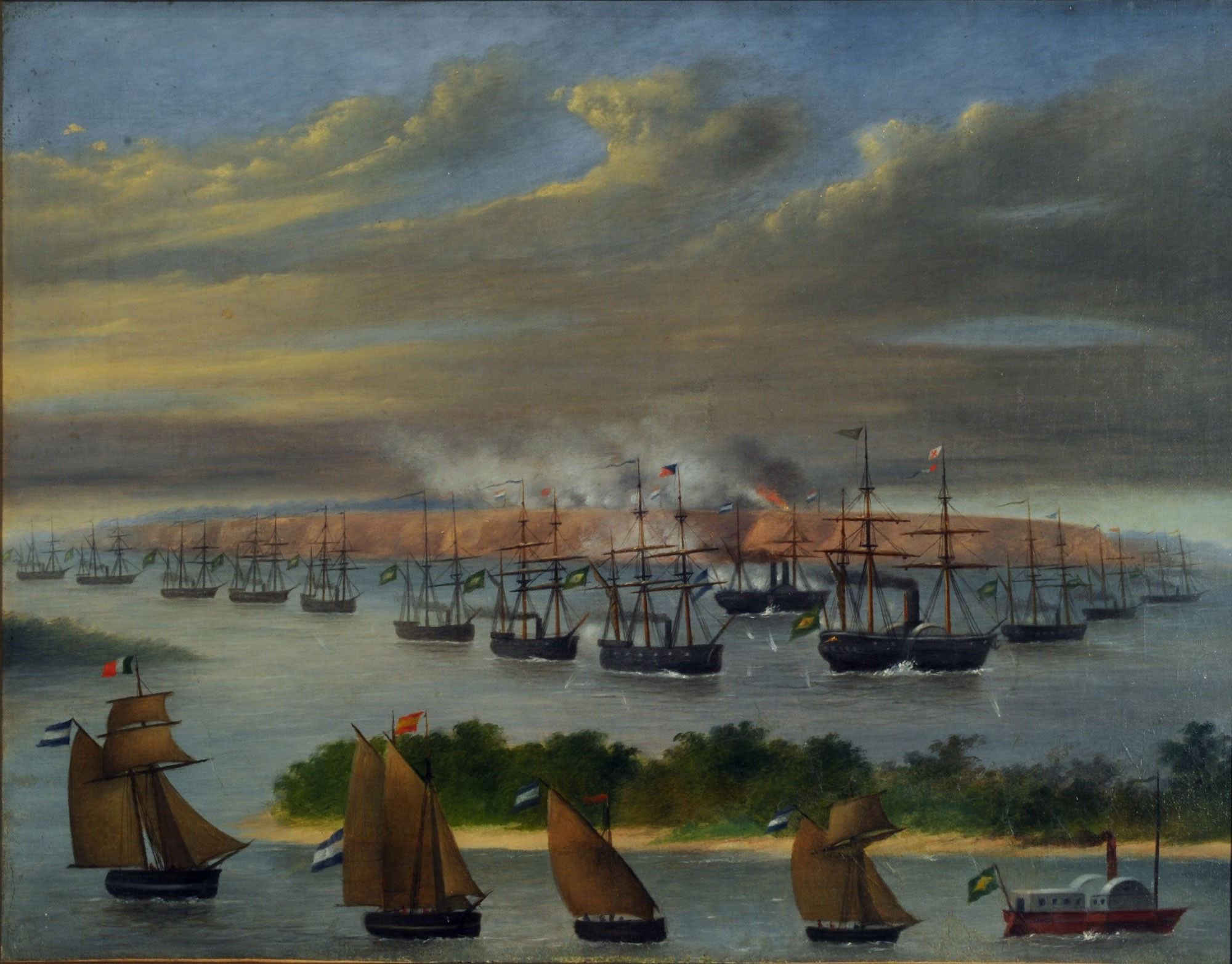 Cándido López, La Escuadra en el canal Privado de paso de la Patria. 1866. 45 x 59 cm, óleo sobre tela. Inv. 7130.